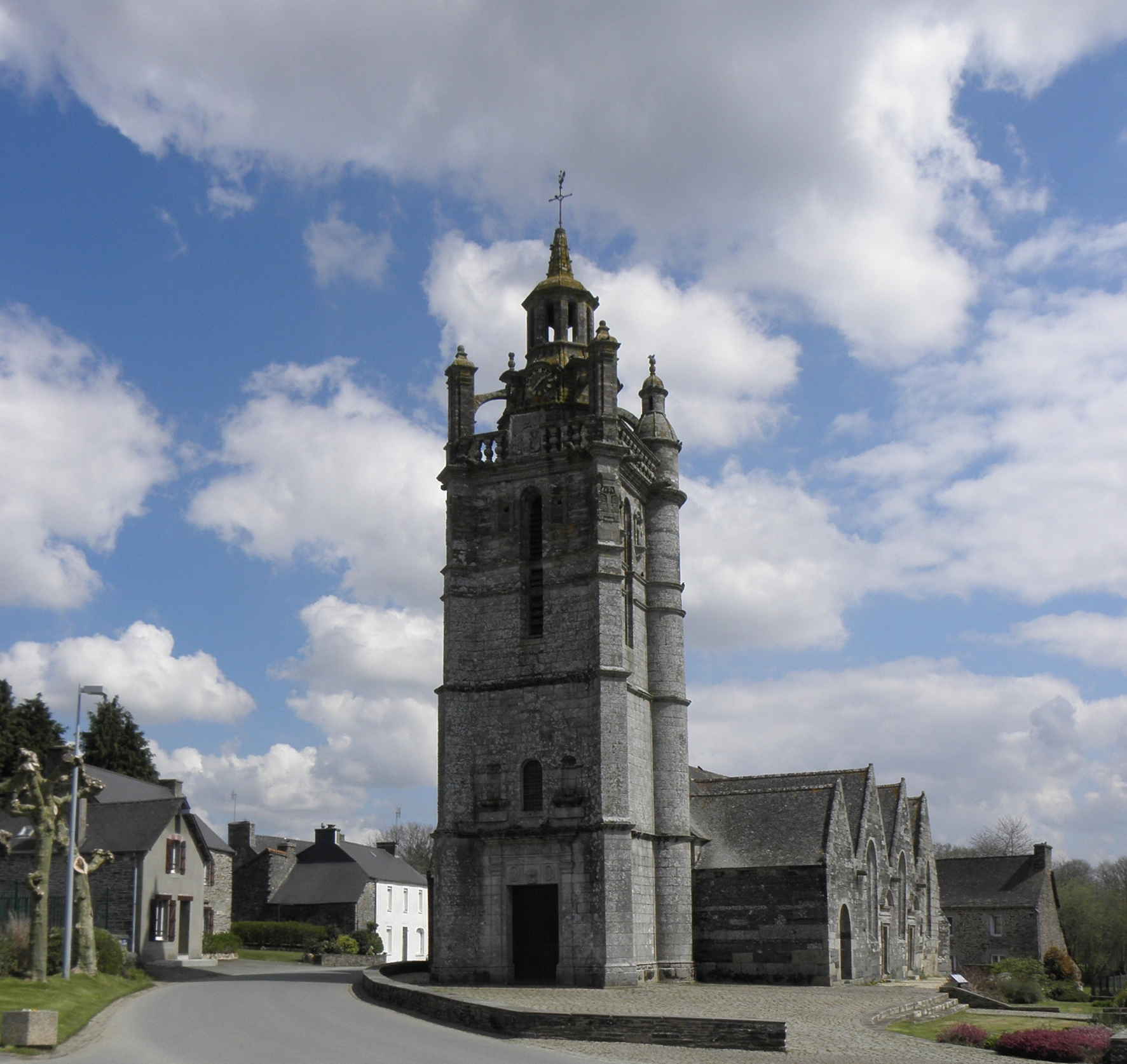 Église Saint-Gildas de Laniscat (22). Clocher et flanc sud.